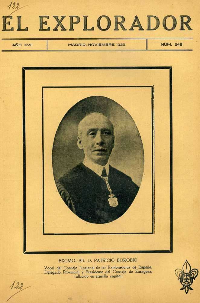 Imagen de Patricio Borobio Díaz en la portada de El Explorador, número 248, noviembre de 1929